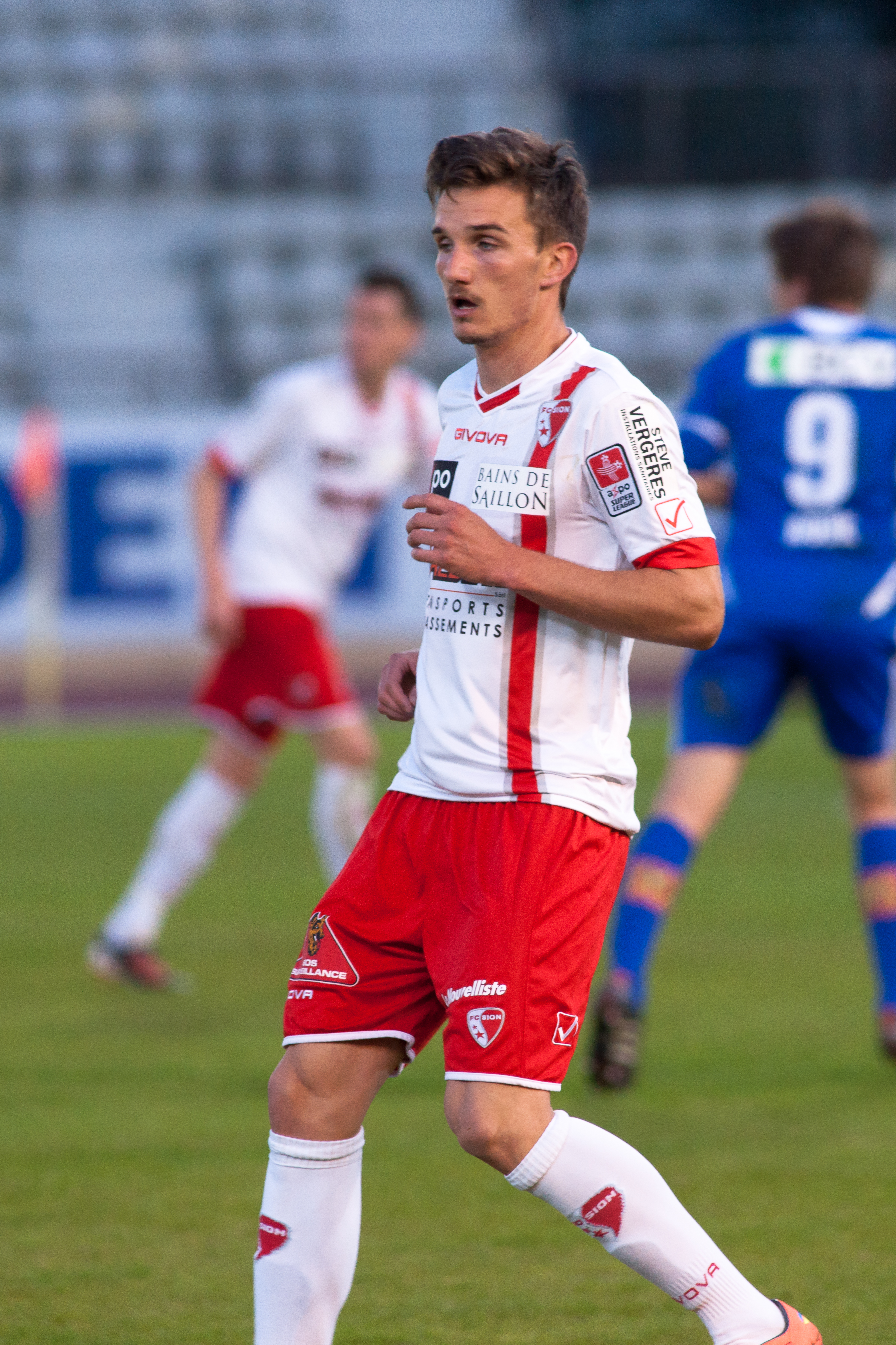 Sébastien Wüthrich - Lausanne vs Sion 02 may 2012